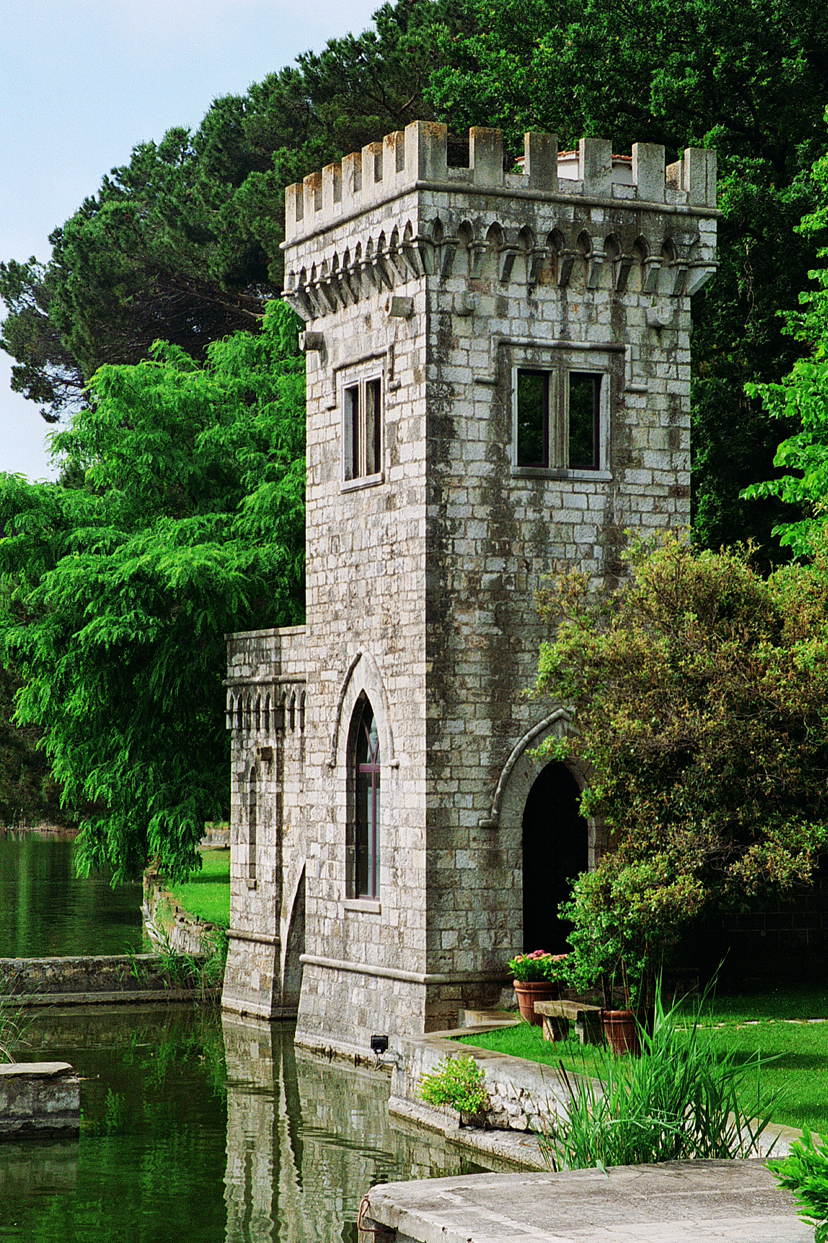 La torre che dà il nome a Torre del Lago Puccini a Viareggio, Toscana, Italia